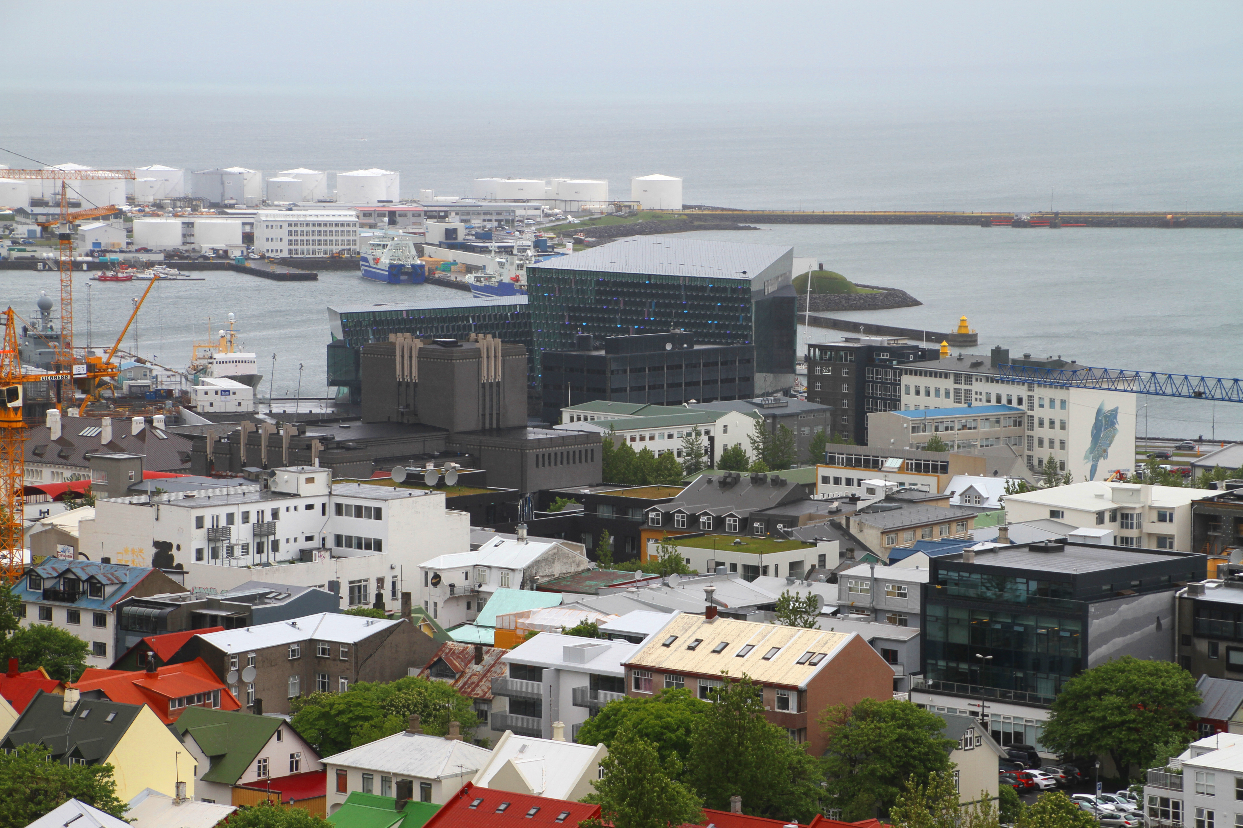 Reykjavík